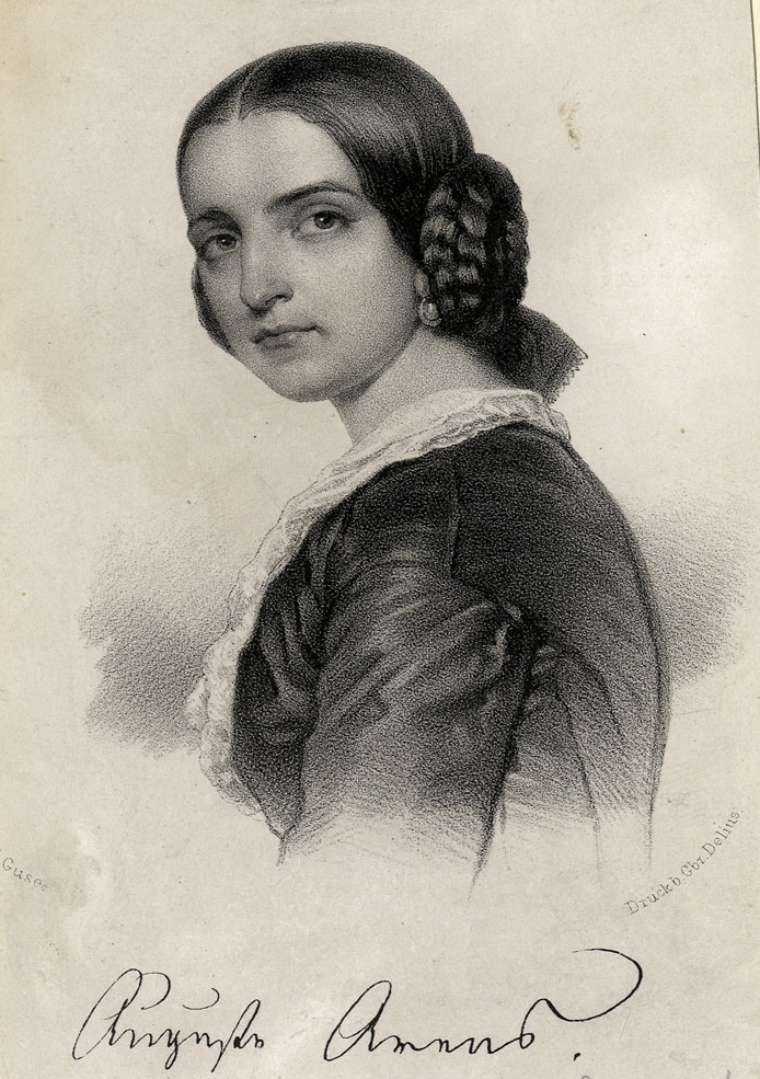 Auguste Arens, Stahlstich; um 1850